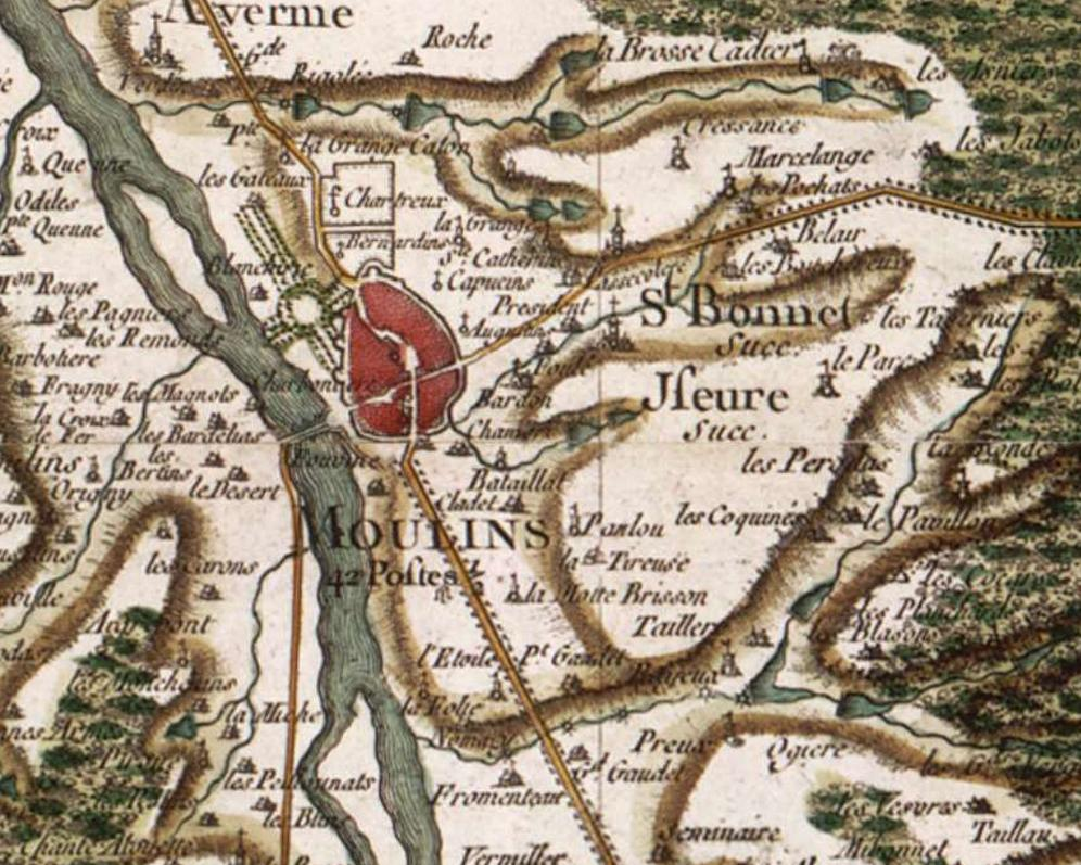 Carte de Cassini. Région de Moulins (Allier).